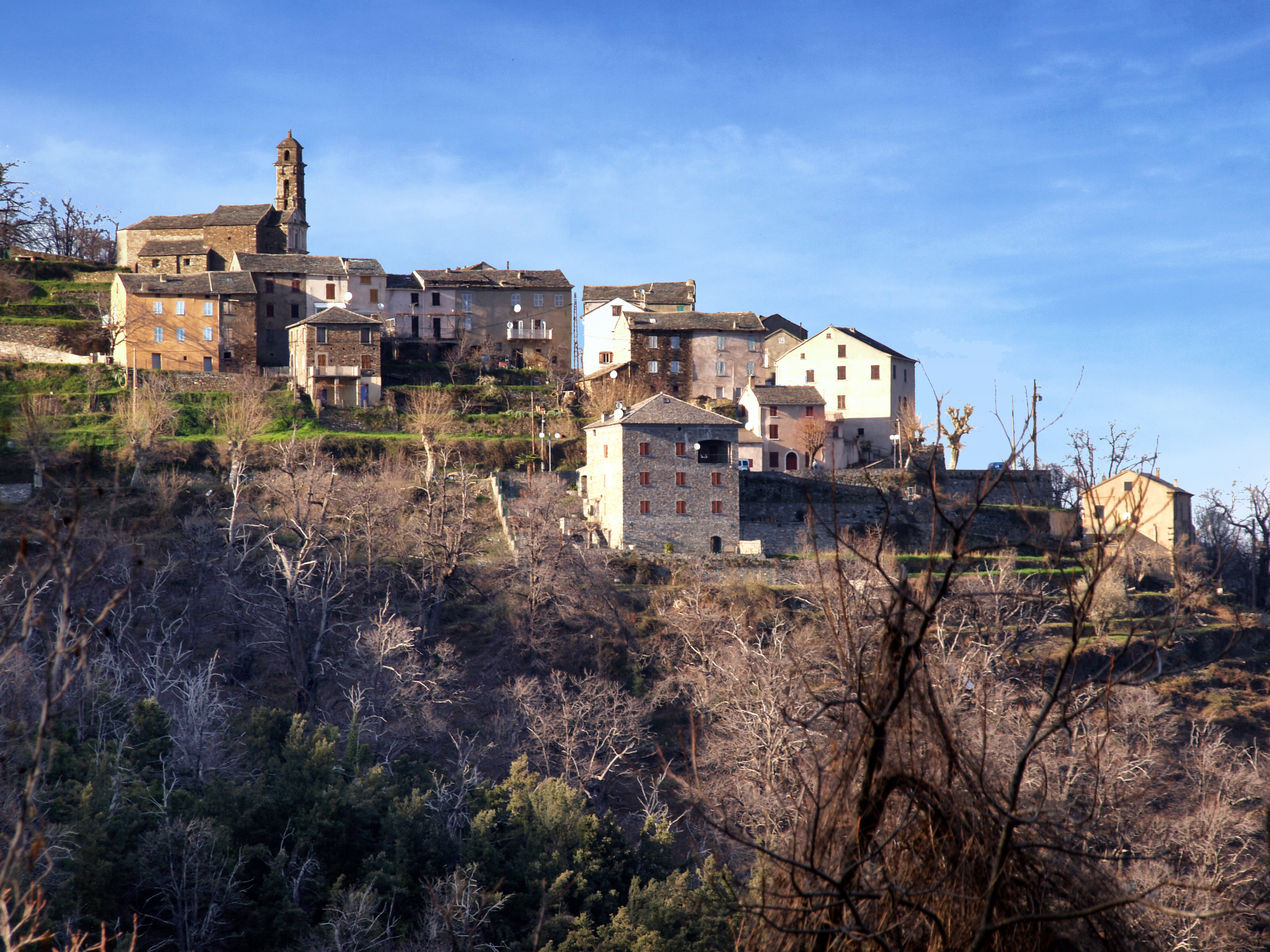 Campana, Castagniccia (Corse) - Vue du village